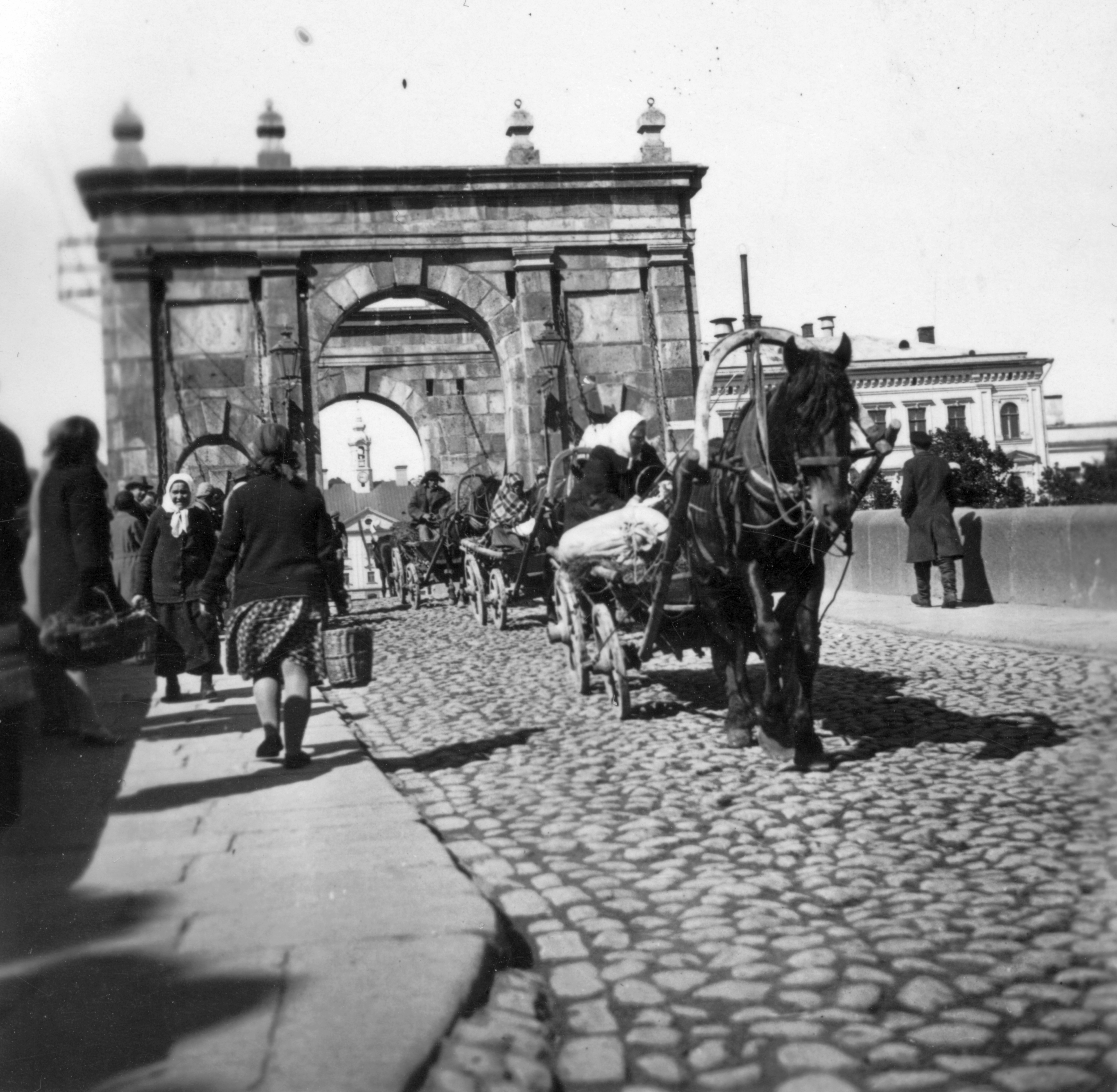 Kőhíd az Emajögi folyó felett, háttérben a városháza tornyos épülete.